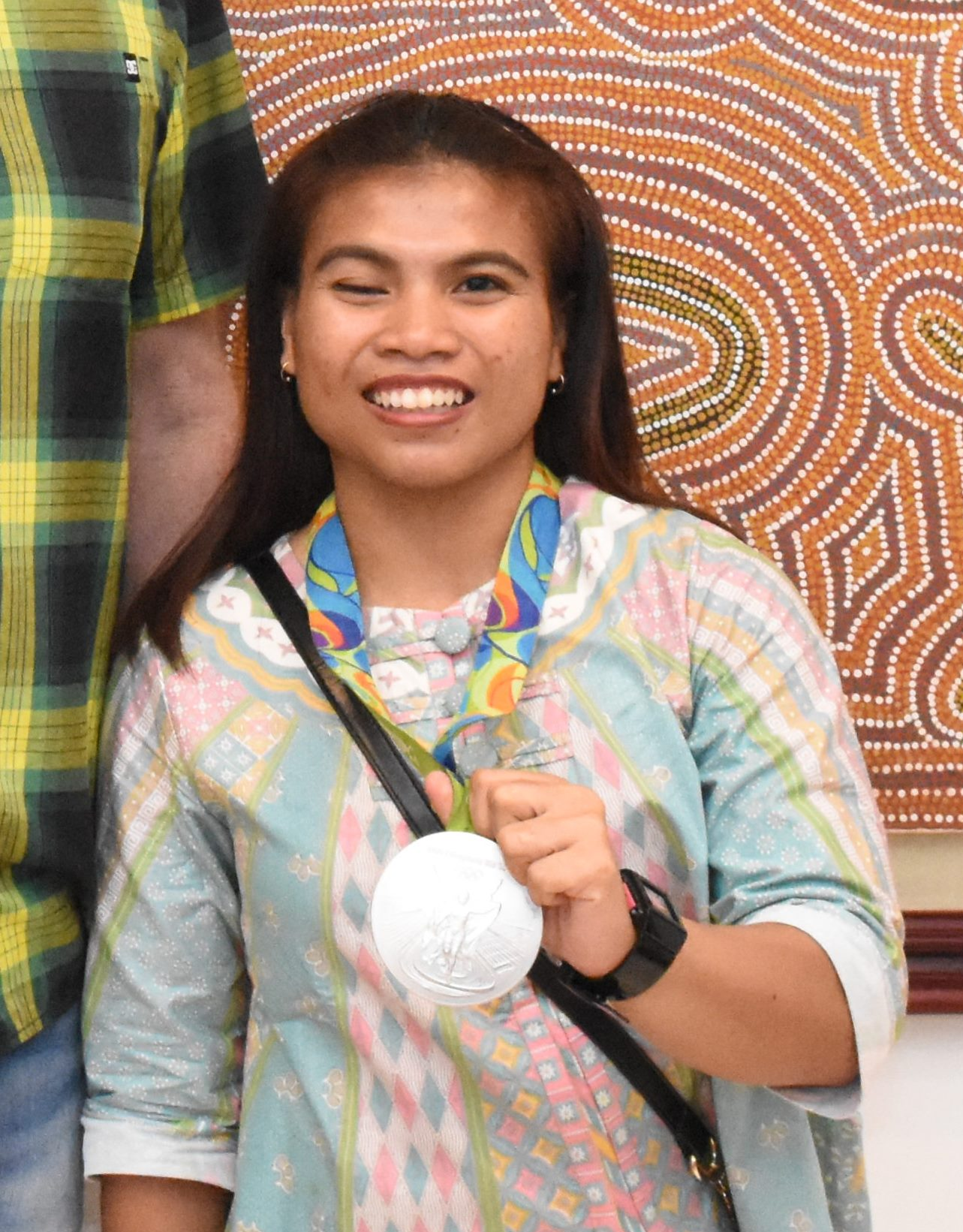 Semalam (06/09) Dubes Paul Grigson menepati janjinya mengundang dua peraih medali perak Olimpiade Rio de Janeiro 2016, Eko Yuli Irawan dan Sri Wahyuni untuk makan malam di kediamannya. Kedua atlet angkat besi Indonesia tersebut dan para tamu lainnya menikmati steak daging sapi Australia yang telah disiapkan oleh perusahaan asal Australia, Elders. Seperti diketahui, tim angkat besi Indonesia untuk Olimpiade Rio bekerja sama dengan Elders dalam hal pasokan daging sapi untuk para atlet angkat besi.